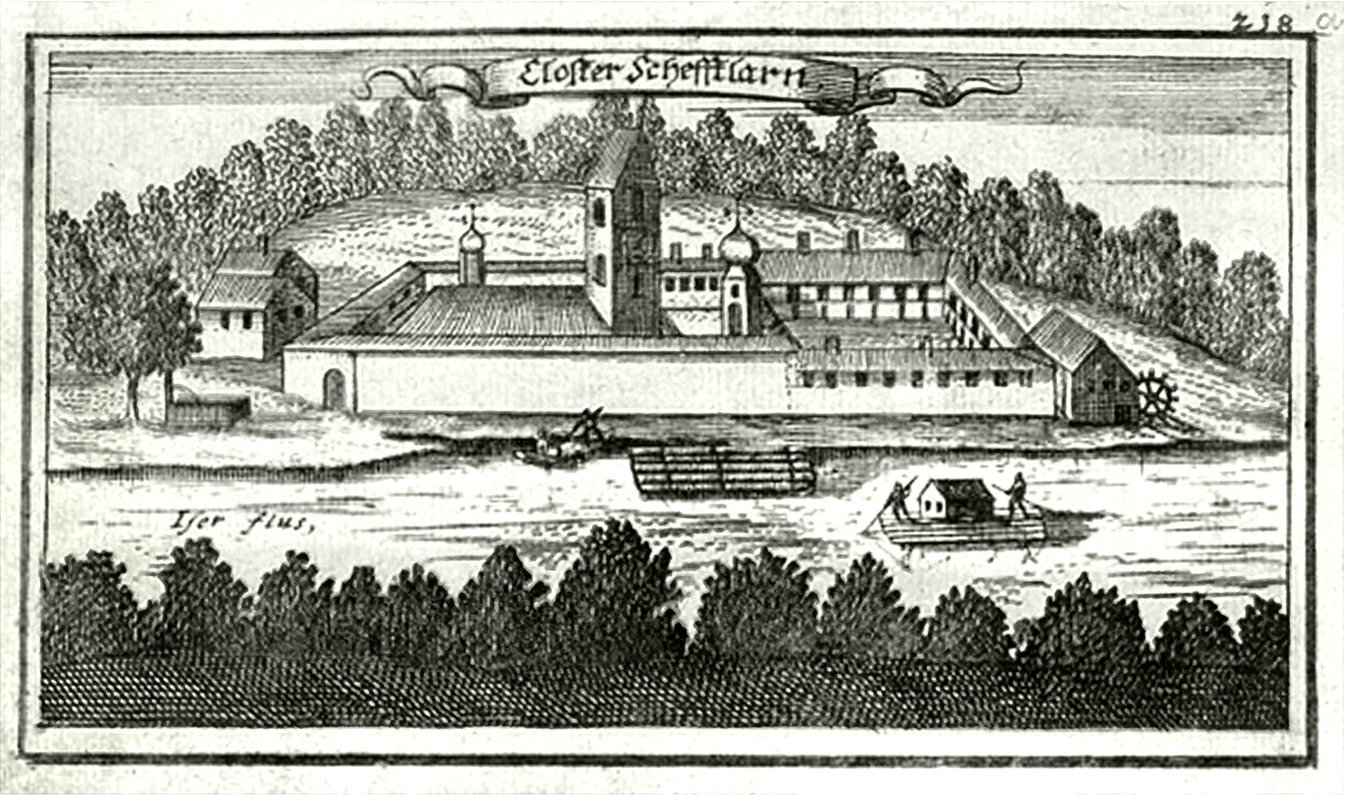 Kupferstich des Klosters Schäftlarn von Johann Ulrich Krauß (1655–1719) aus dem zweiten Band des Churbaierischen Atlanten, der 1690 erschien und von Anton Wilhelm Ertl (1654–1715) verfaßt war.